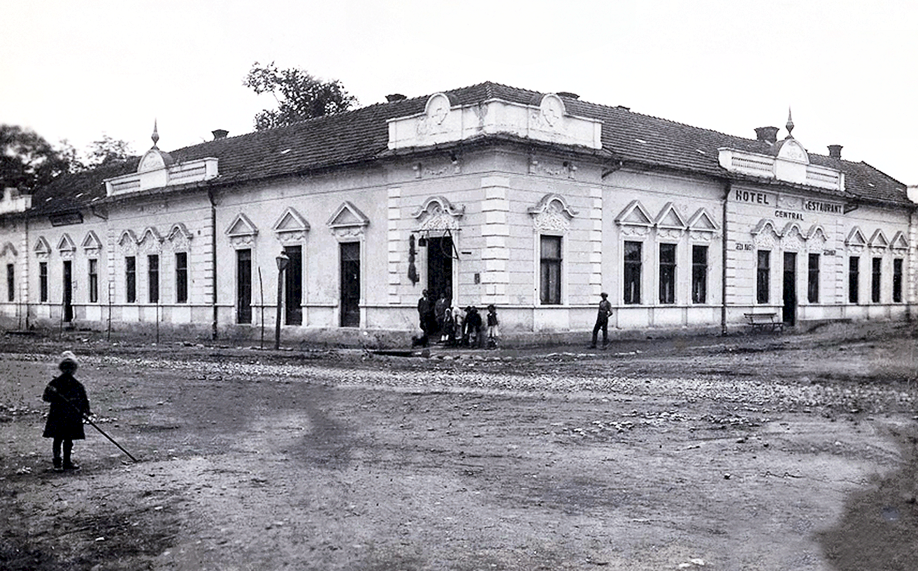 Bozovici Hauptplatz mit Hotel und Restaurant um 1900